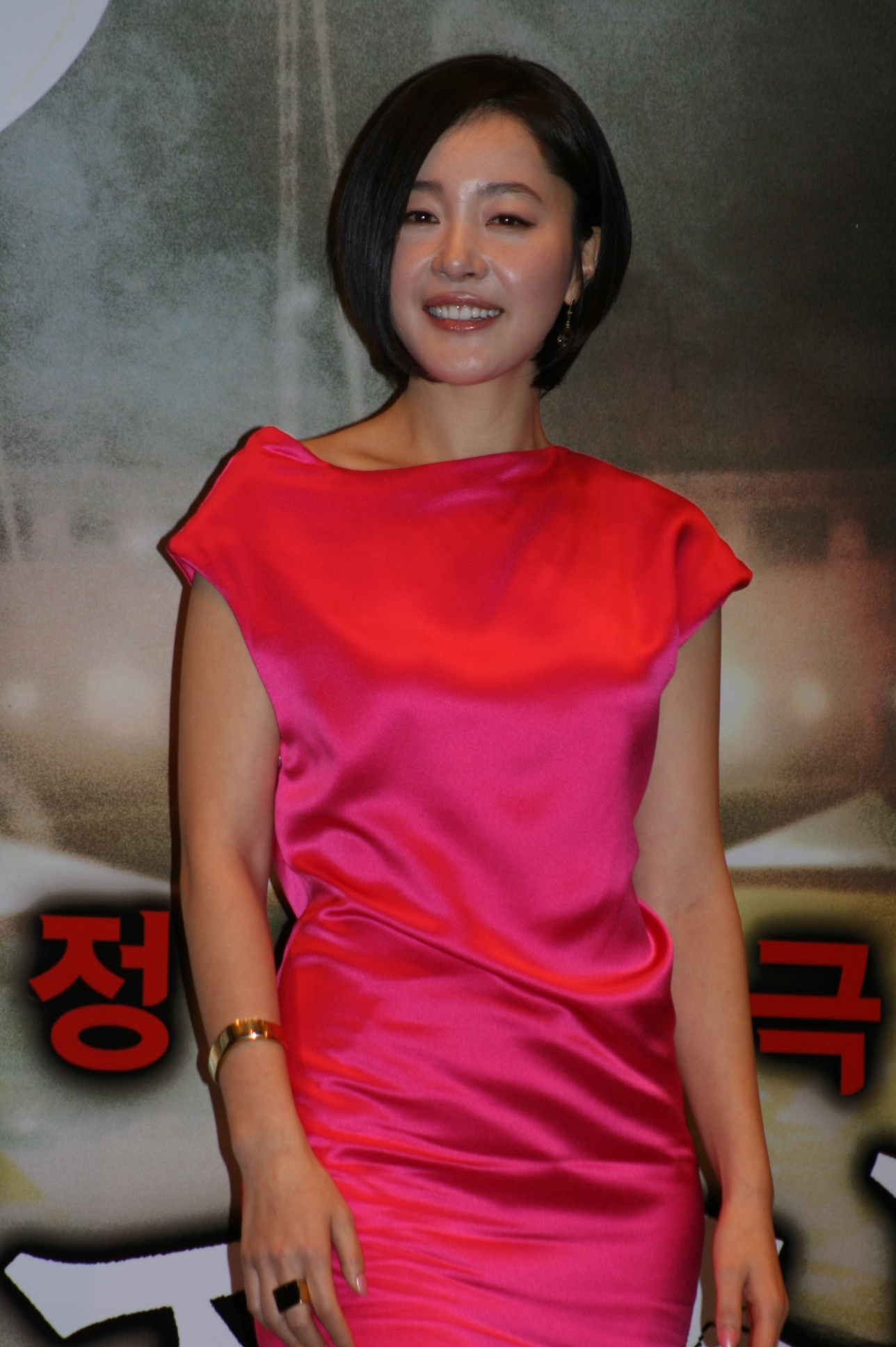 2009년 2월 26일 서울 CGV 압구정에서 열린 영화 《그림자 살인》 제작보고회에 참석한 엄지원.